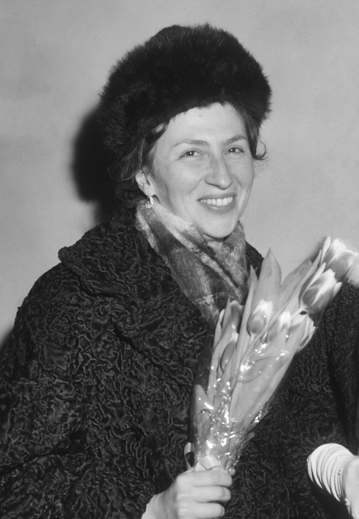 Aankomst Russische musici op Schiphol, links Bella Davidovitch (pianiste) en Zara Doulouchova (zangeres)